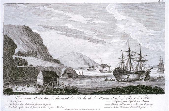 Iconographie datant de 1820.